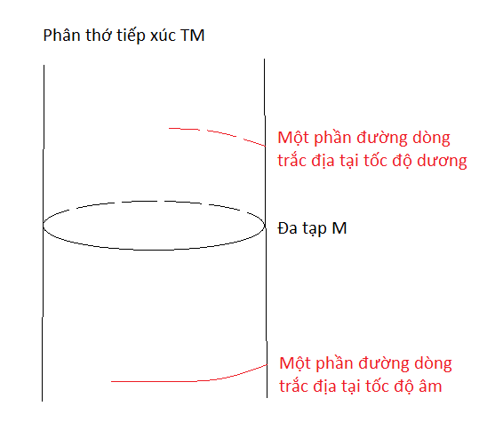 Hai đường dòng trắc địa của đường tròn. Mô tả cho trang wiki Đường trắc địa.